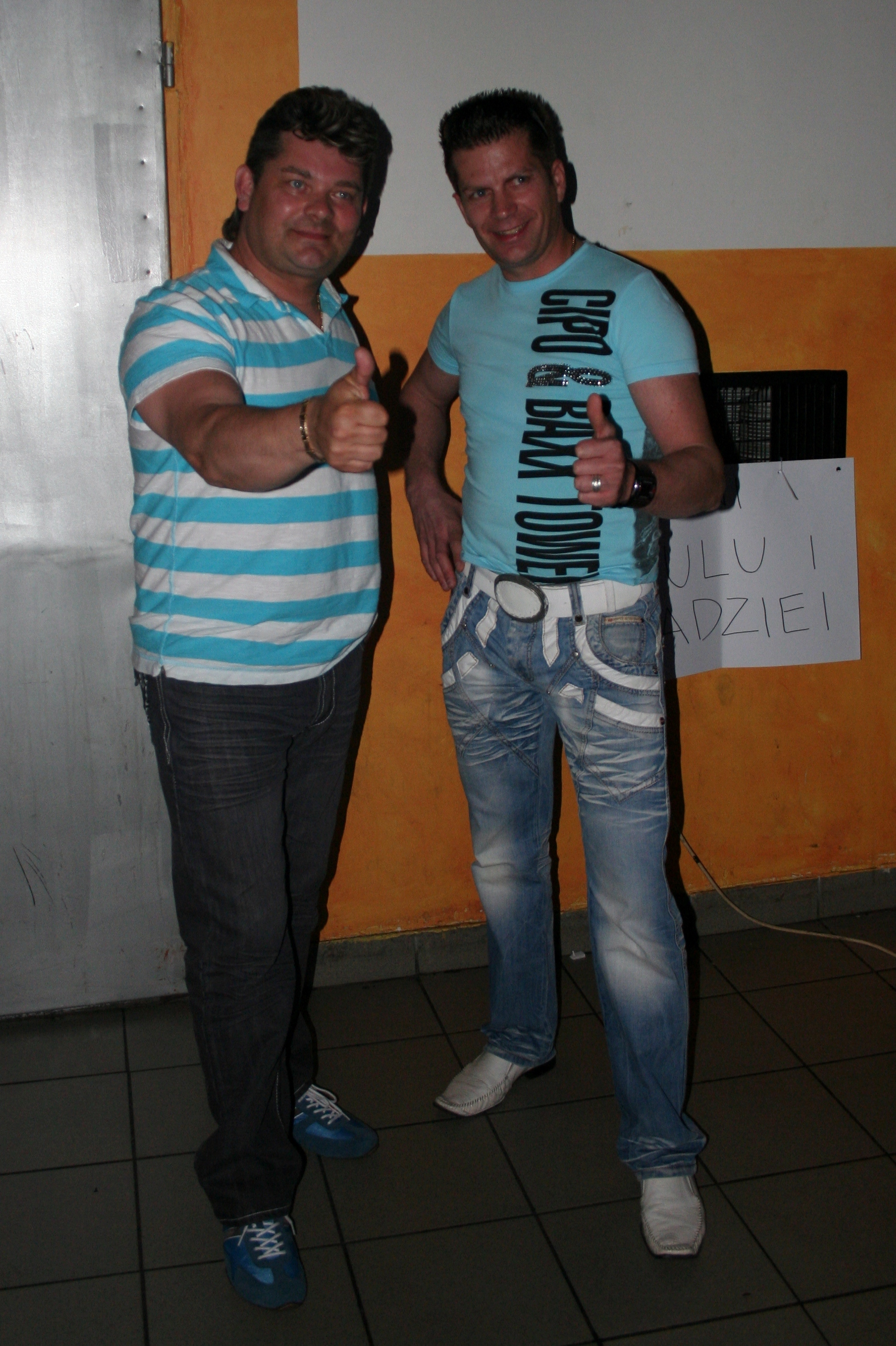 Osiedle Ligota w Katowicach, klub studencki "Straszny Dwór". Zespół Akcent tuż przed koncertem w czasie Juwenaliów Śląskich 2011. Z lewej Zenon Martyniuk, z prawej Ryszard Warot.